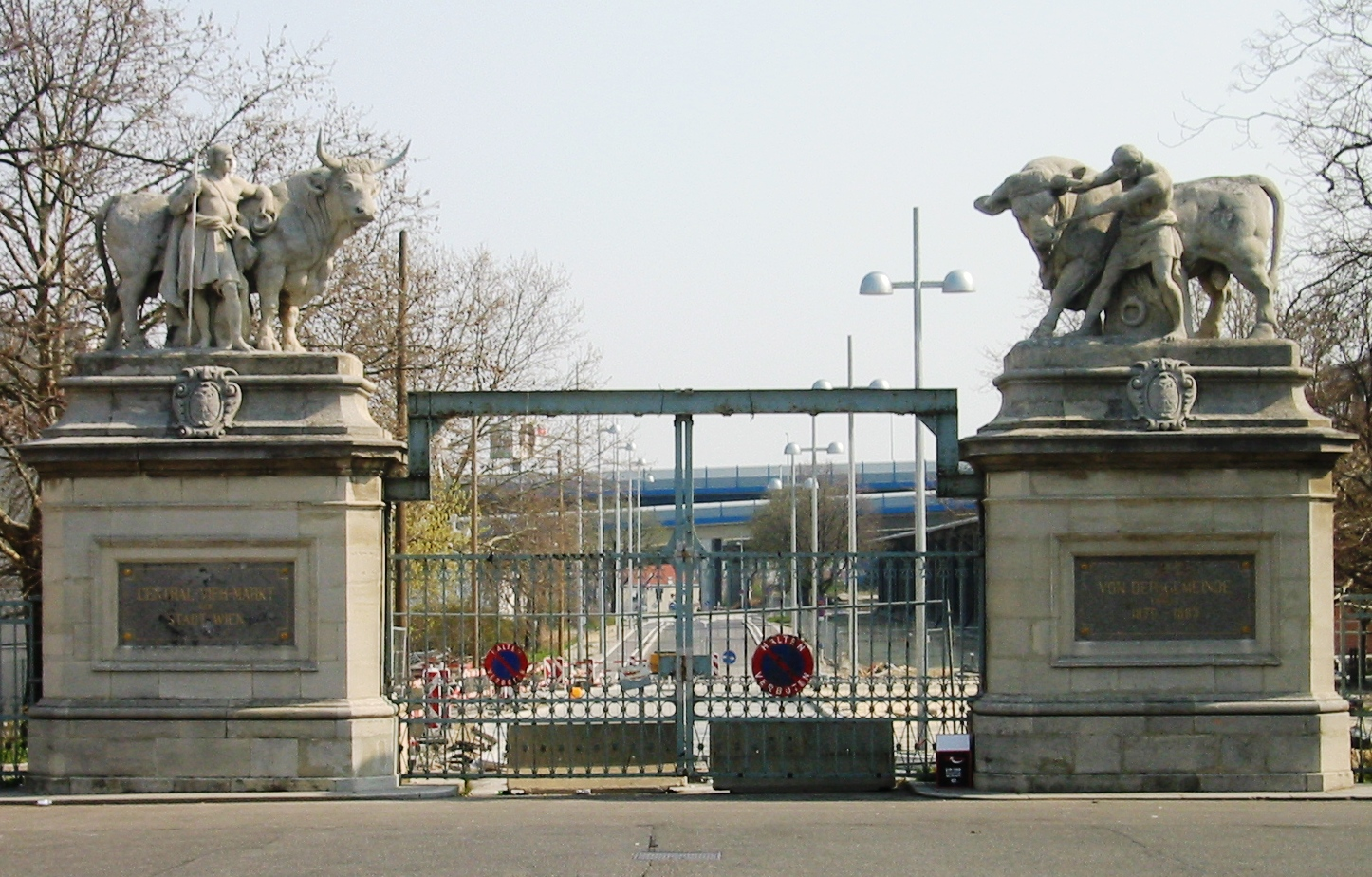 Wien Sankt Marx Viehmarkt Toranlage